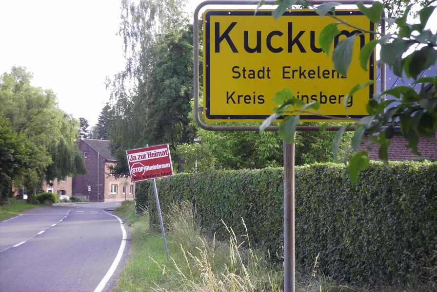 Summary Bildbeschreibung: Ortseingang Kuckum. Quelle: eigenes Foto... Fotograf/Zeichner: bodoklecksel 20:31, 25. Jun 2006 (CEST) Datum: Juni 2006... Sonstiges: ...